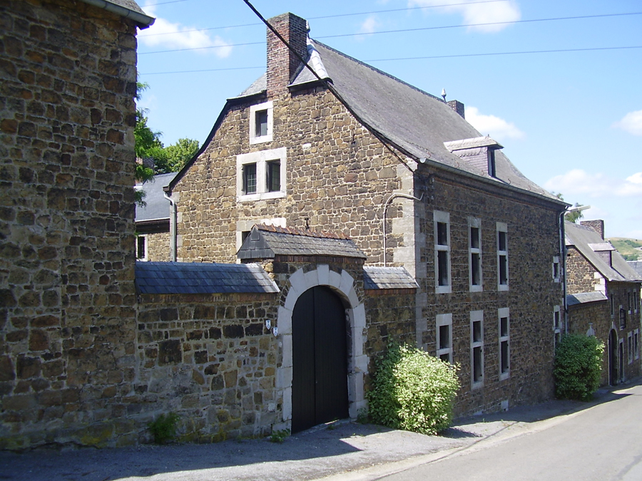 Maison de la Héna, rue Lecrénier à Hermalle-sous-Huy, Belgique. Monument classé. XVIIe s.